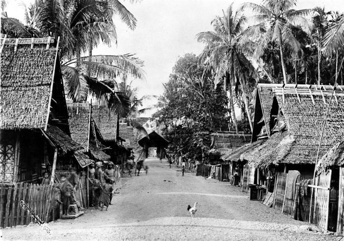 Repronegatief. Dit is natuurlijk allereerst een mooie foto van een dorp met zijn traditionele huizen en zijn palmen in de 'zuidwestarm' van Celebes. Op de voorgrond zien we een groepje dorpelingen en in het midden van de foto een kip en op de achtergrond een overdekte brug over de rivier met dezelfde naam als het dorp, Segeri. Het dorp is echter ook bekend geworden door de onderzoekingen van de antropoloog Chabot die hier in de jaren veertig een aantal travestieten (bissu) aantrof die het restant vormden van een verschijnsel dat ooit meer verbreid was geweest. Aan vele hoven in Zuidwest-Celebes zorgden vroeger mannen, die zich als vrouwen verkleedden en gedroegen, voor de rijkssieraden en voerden de daarbij behorende rituelen uit. (P. Boomgaard, 2001). Straatgezicht bij de brug